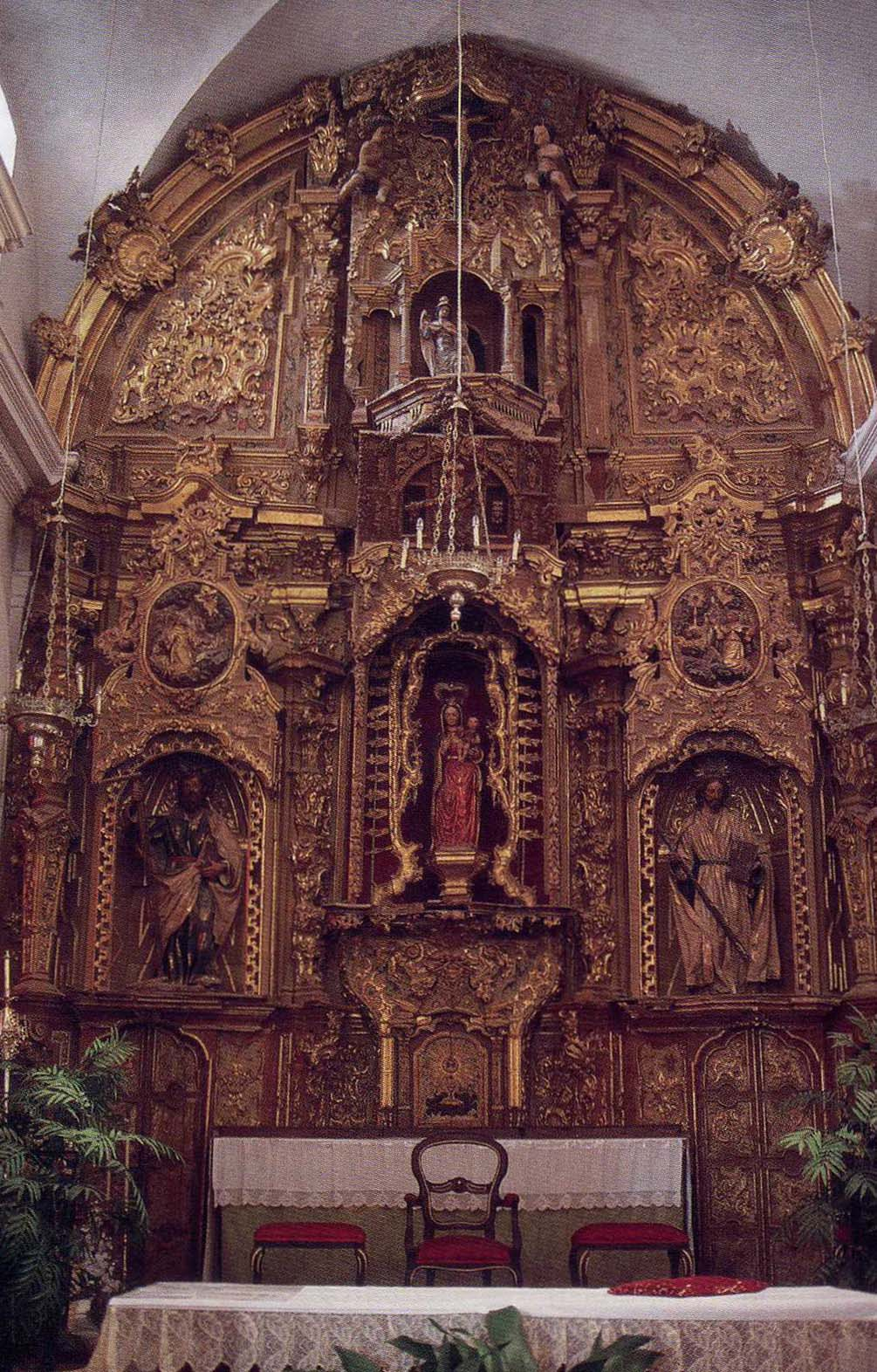 En la cabecera de la nave central, hallamos el magnífico Retablo Mayor de la Iglesia. Tal despliegue ornamental, de acuerdo con la mentalidad barroca,busca atraer al fiel hacia la Divinidad